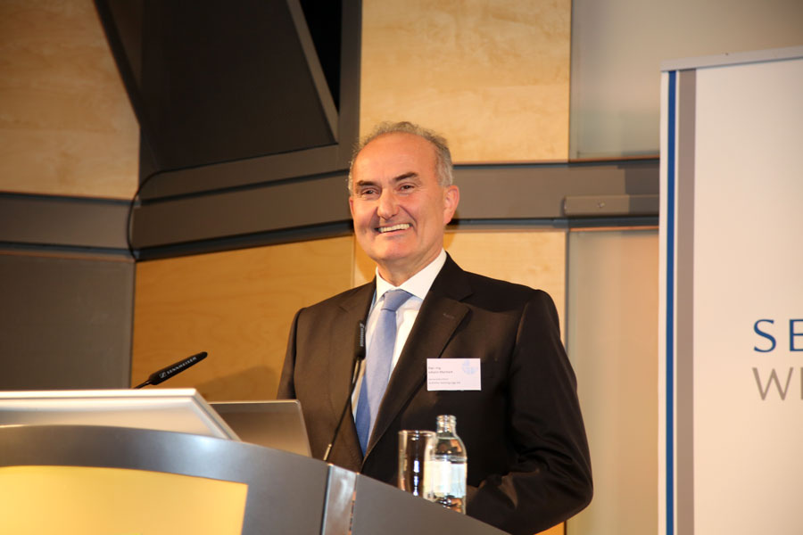 Gen. Dir. DI Johann Marihart-9005